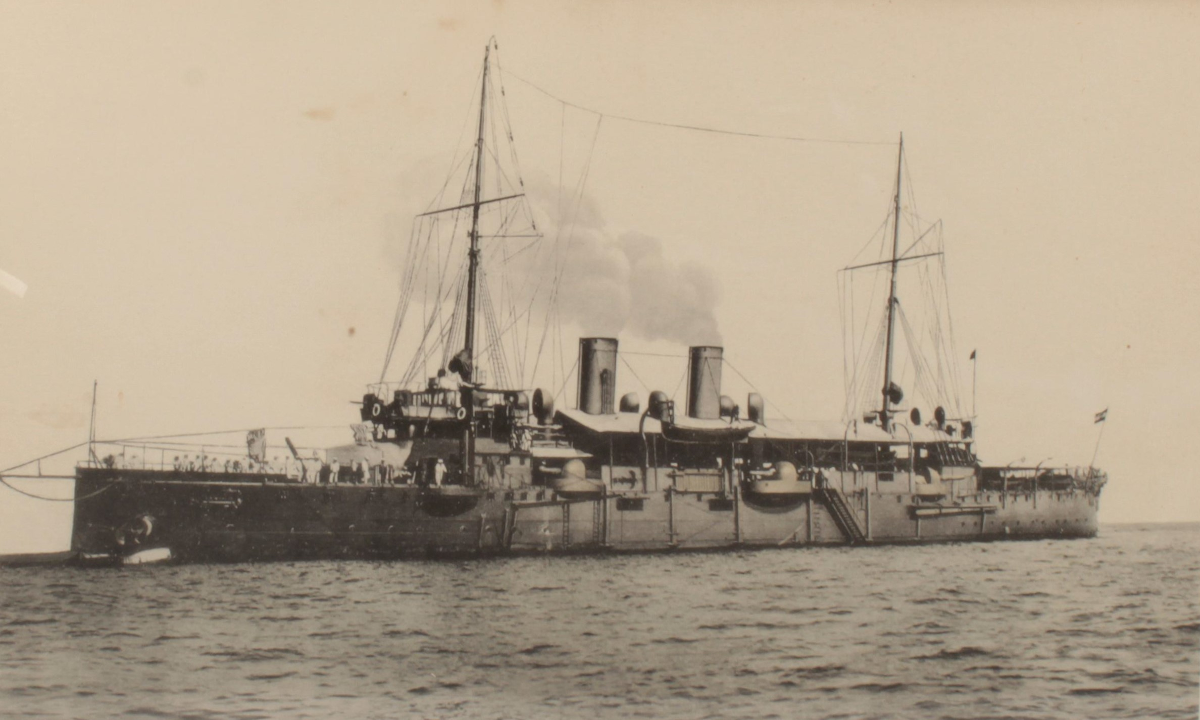 SMS Kaiserin Elisabeth der k. u. k Kriegsmarine